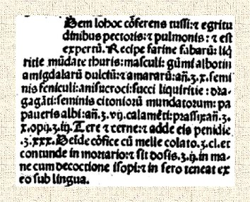 Mesue Opera medicinalia Ibn Māsawayh, Yaḥyā Abū, recette de Looch.